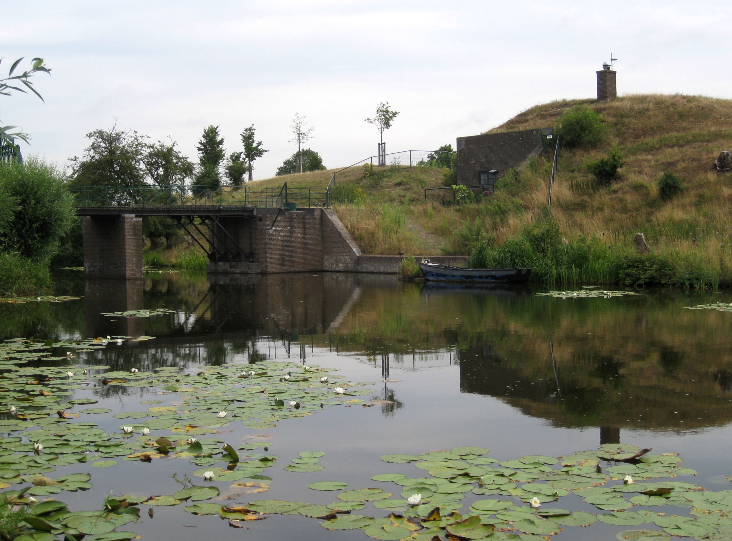 Rijksmonumenten Naarden